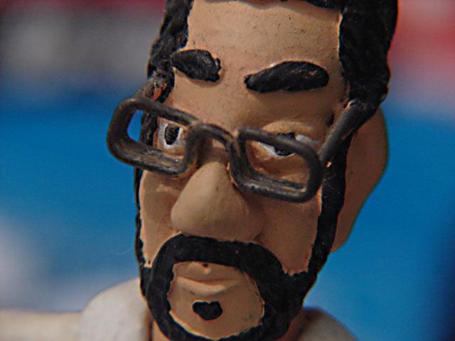 Boneco representando a figura do cantor brasileiro Renato Russo.